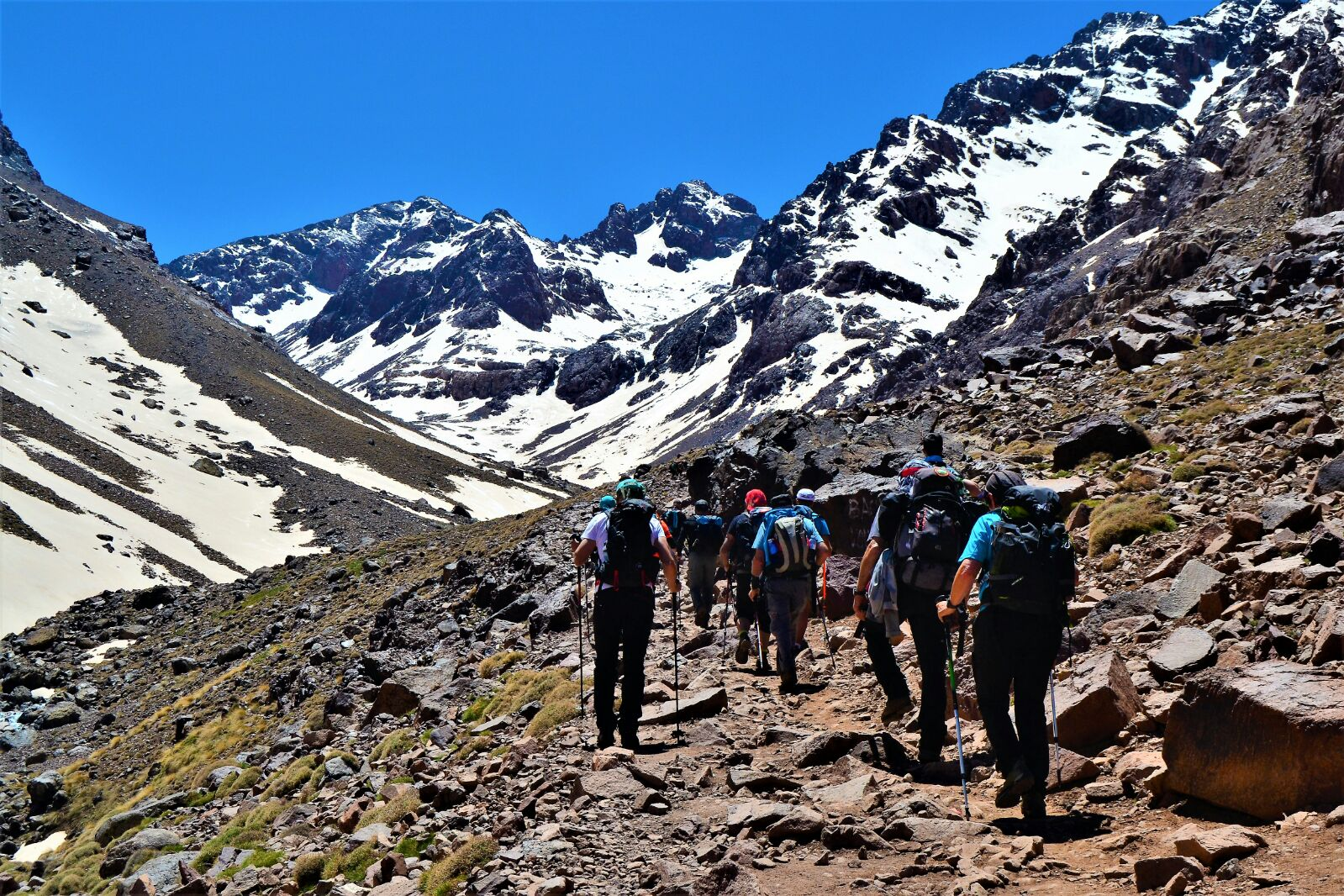 Subida al Toubkal La Cumbre más alta de Marruecos y Africa del Norte Toubkal 4167m